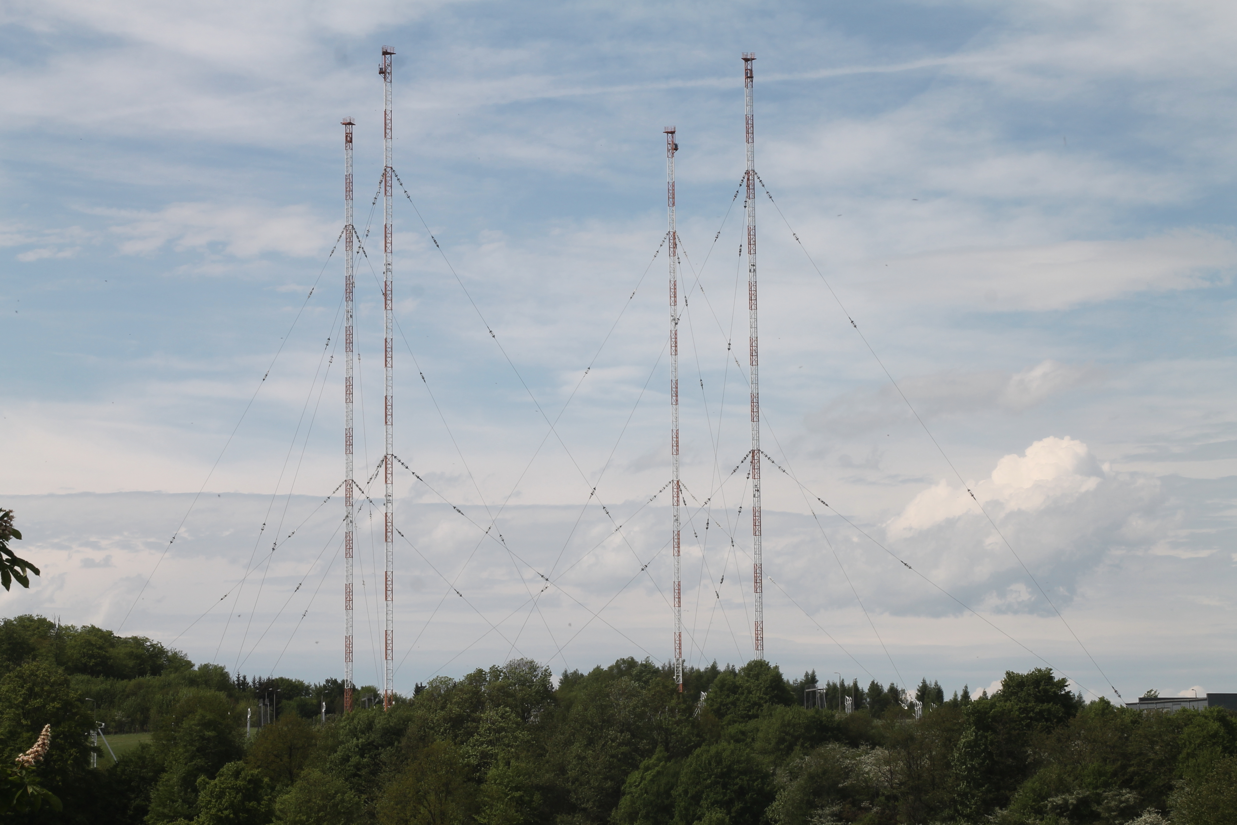 Sendeanlage der "Stimme Rußlands" in Wachenbrunn, - OpenStreetMap (Info)